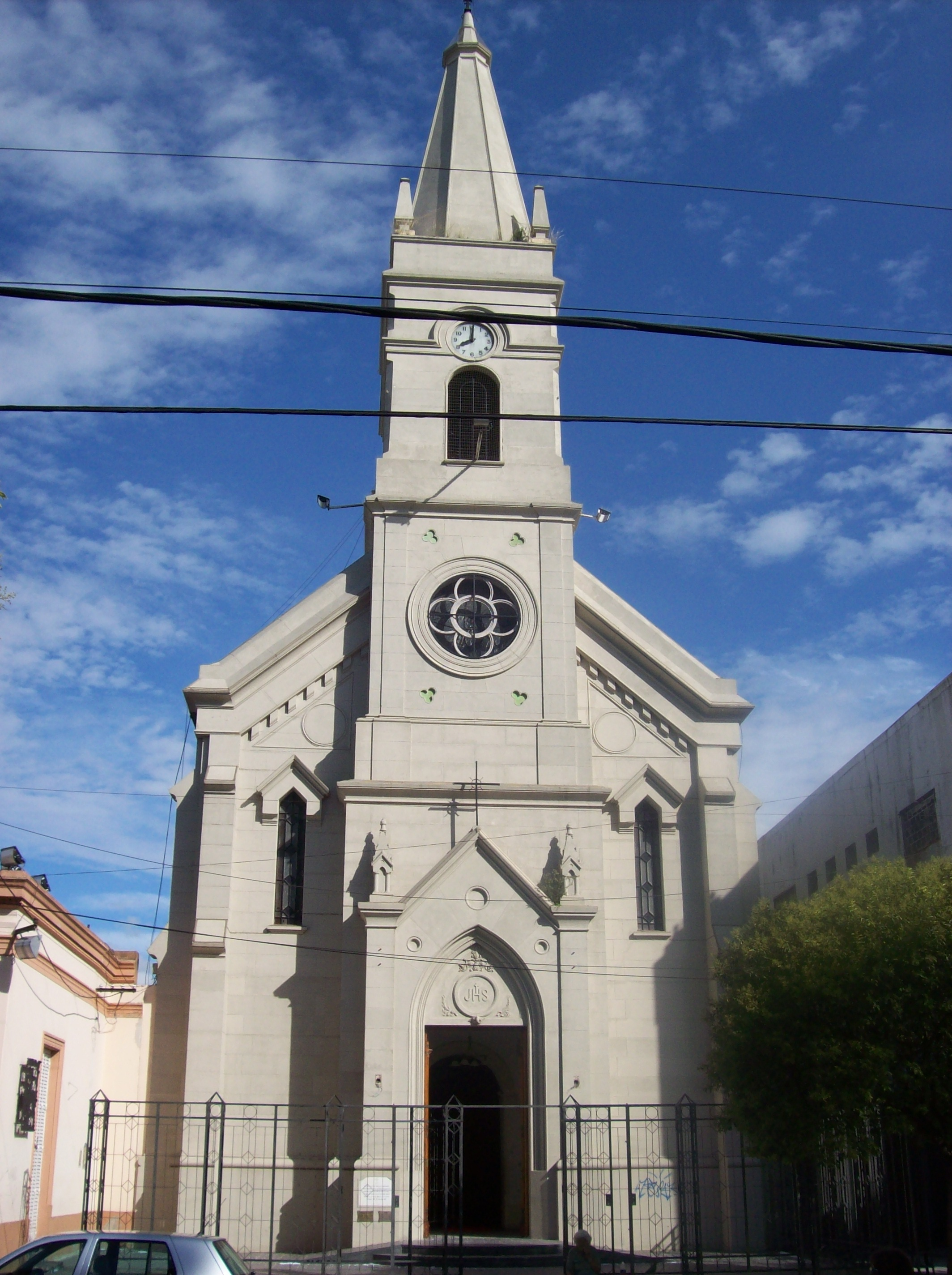 Parroquia Natividad de Nuestro Señor Jesucristo en la ciudad de Belén de Escobar, partido de Escobar, provincia de Buenos Aires, Argentina.